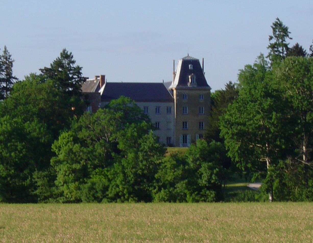 Vue du château de Montribloud depuis la route de Neuville. Le château nous présente sa façade sud avec sa tour du moyen-âge en briques.